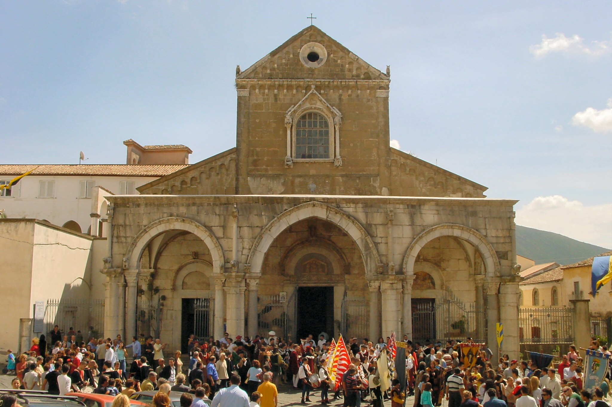 Sessa Aurunca (CE)- Duomo: Costruito nel XII secolo (consacrato nel 1103) e uno dei più significativi esempi di architettura romanica applicata in Campania. Presenta un interessante connubio tra i Materiali di reimpiego provenienti da antichi Edifici romani (Tempio di Mercurio e di Ercole, Teatro), Caratteri dell'Architettura romanica ed Elementi del restauro barocco Avvenuto Intorno al 1758. La facciata, con frontone triangolare superiore e finestrone centrale, preceduta da e un portico del XIII Secolo a tre arcate sorrette da Pilastri e colonne. Sotto il porticato si aprono i tre portali di alla chiesa accessori decorati con architravi ed Elementi marmorei di spoglio. La pianta e A croce latina, a tre navate da colonne di Divise diversificato Materiali. Pregevole e Il Pavimento musivo del XII Secolo Nella navata centrale. Di grande Valore artistico Sono inoltre il candelabro per il cero pasquale ed il pulpito, opere del XIII Secolo del maestro Peregrino da Sessa. Il candelabro ha base di Scolpita con una figura di Rilievo e inserti di mosaico, il pulpito decorato da mosaico e bassorilievi E una Struttura rettangolare, sorretta da sei colonnine Che Poggiano do leoni di marmo. Nella cappella del Sacramento, da ammirare e La Comunione degli Apostoli di Luca Giordano.